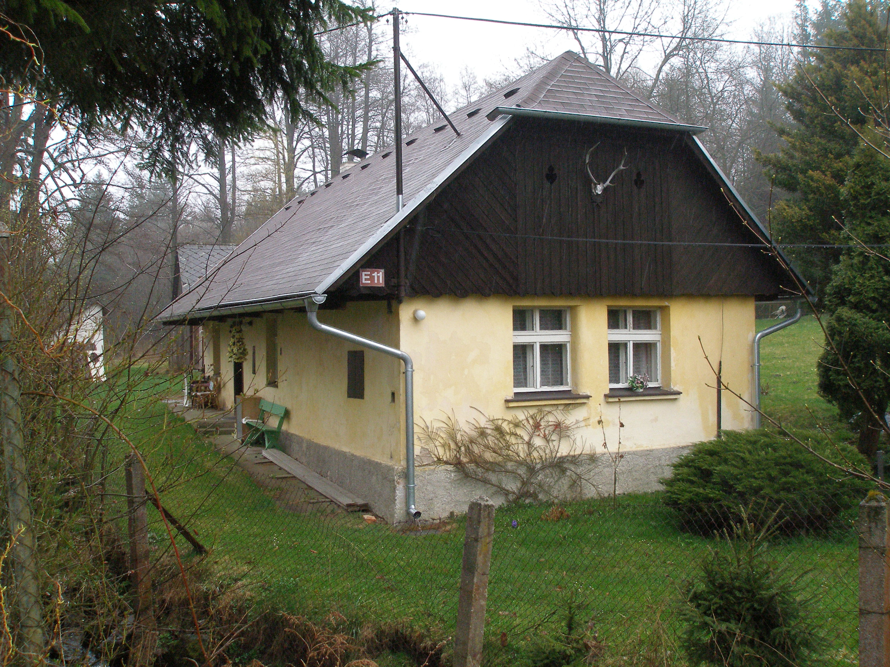 Dům na severovýchodním okraji Míšova